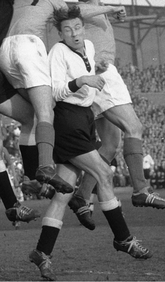 Heinz Wewers en 1957